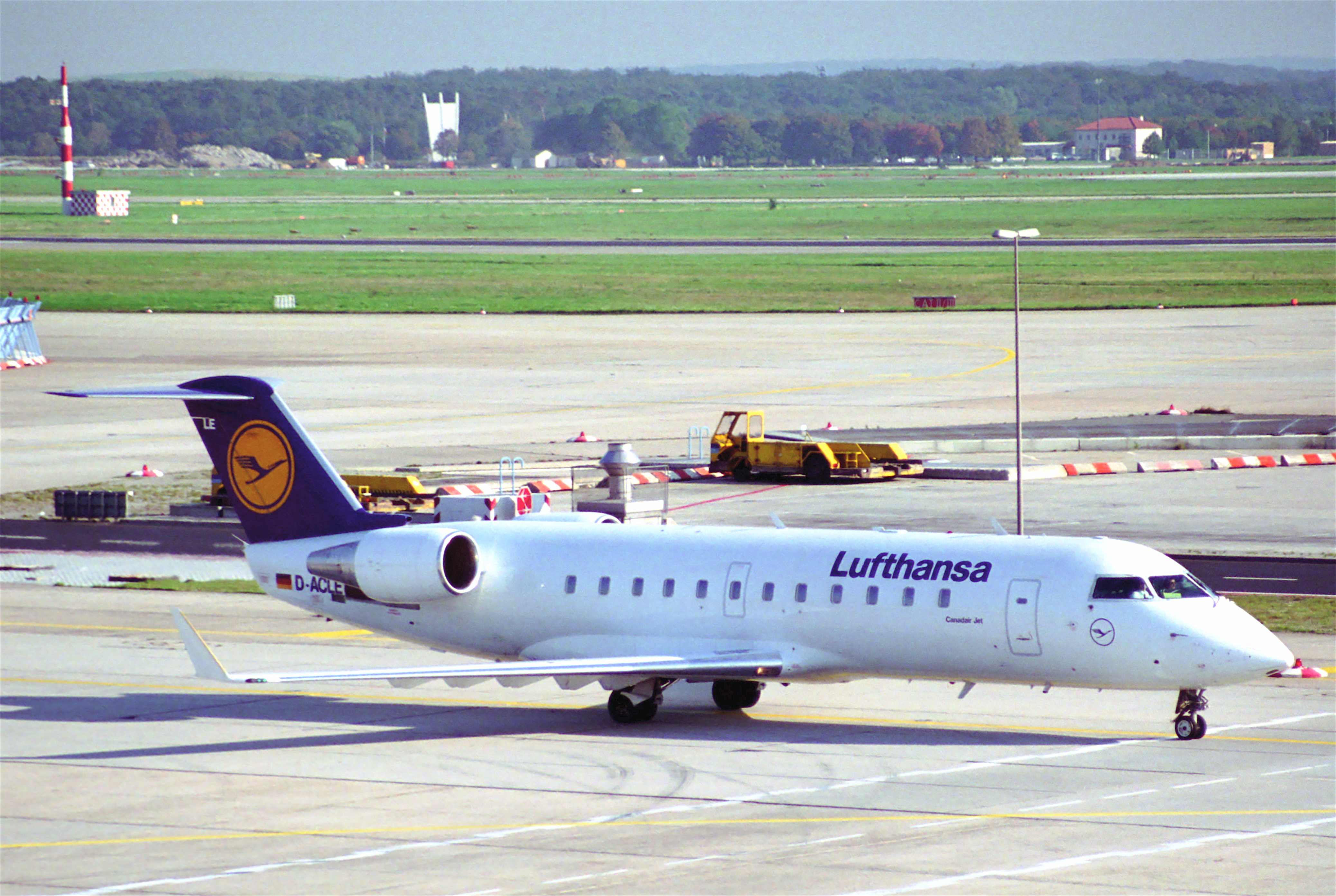 D-ACLE@FRA;10.10.1995